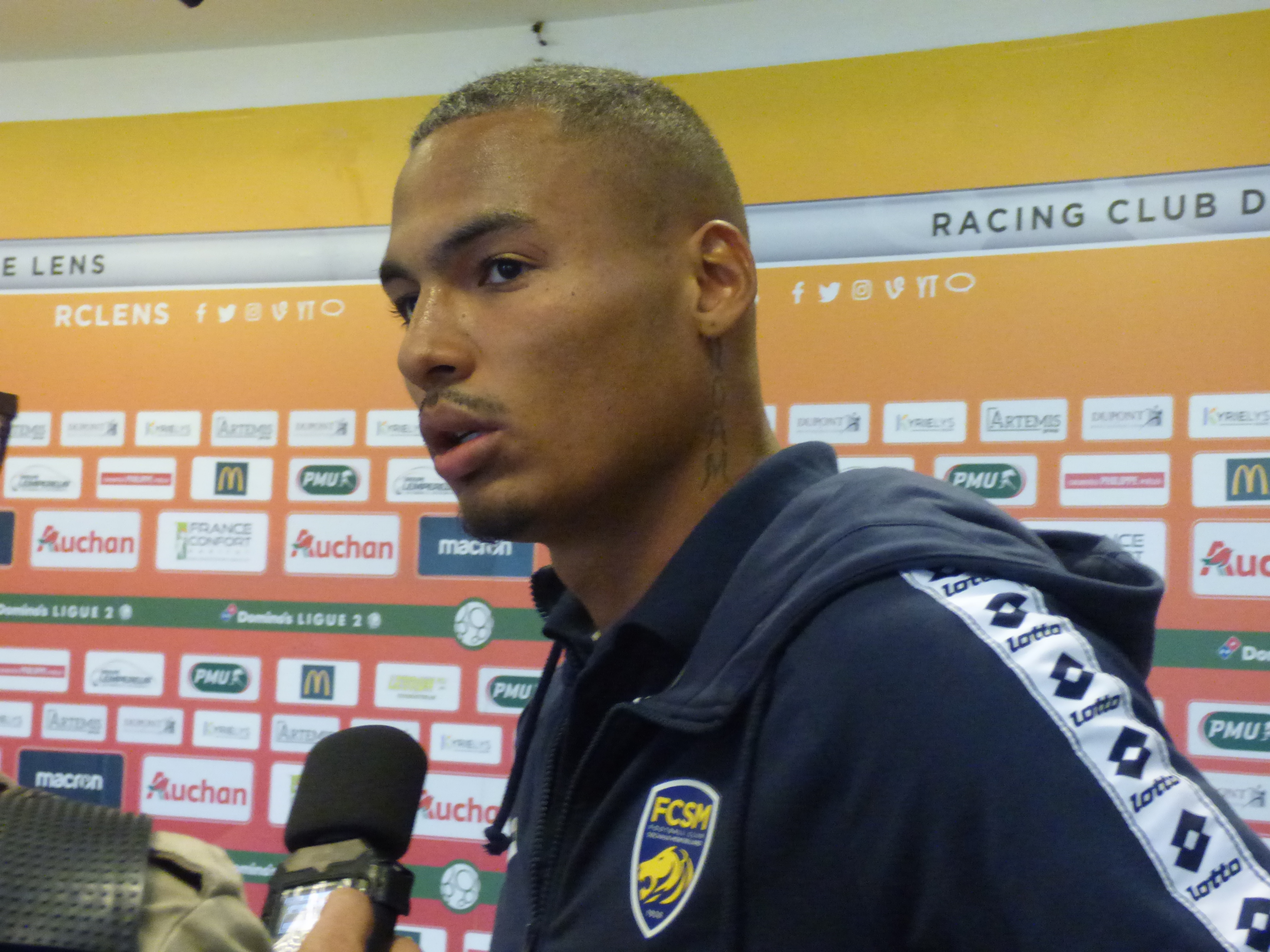 Olivier Verdon après le match Lens / Sochaux, comptant pour la septième journée du championnat de France de football de Ligue 2, le 15 septembre 2018.